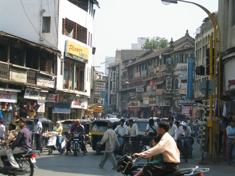 Straßenszene von Poona (Indien)